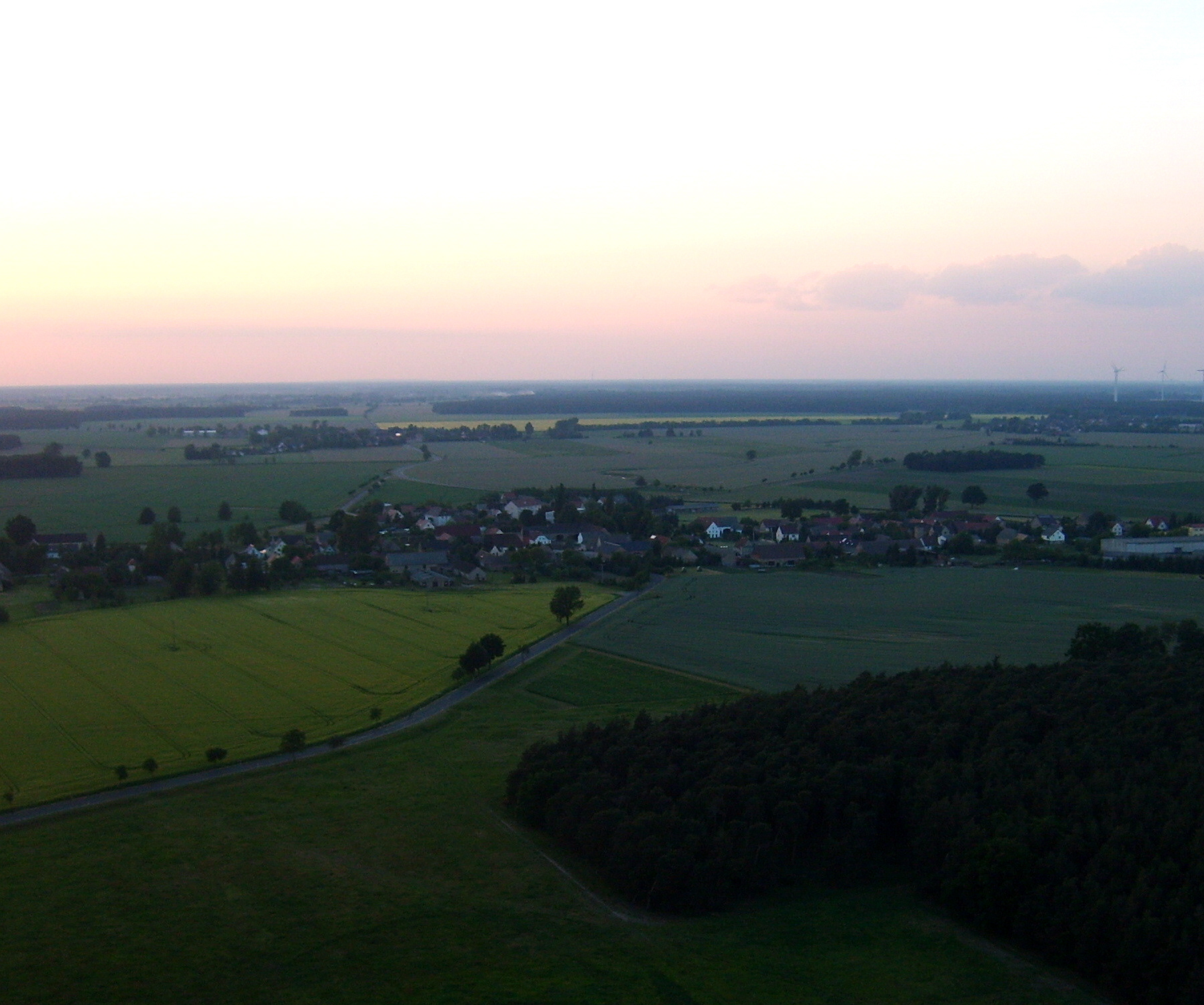 Luftaufnahme von Bönitz im Landkreis Elbe-Elster.